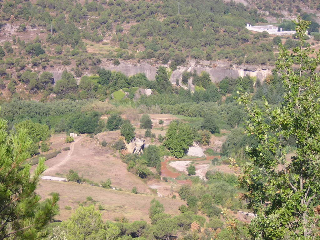 L'Estoviada de la Païssa (Monistrol de Calders, Moianès)